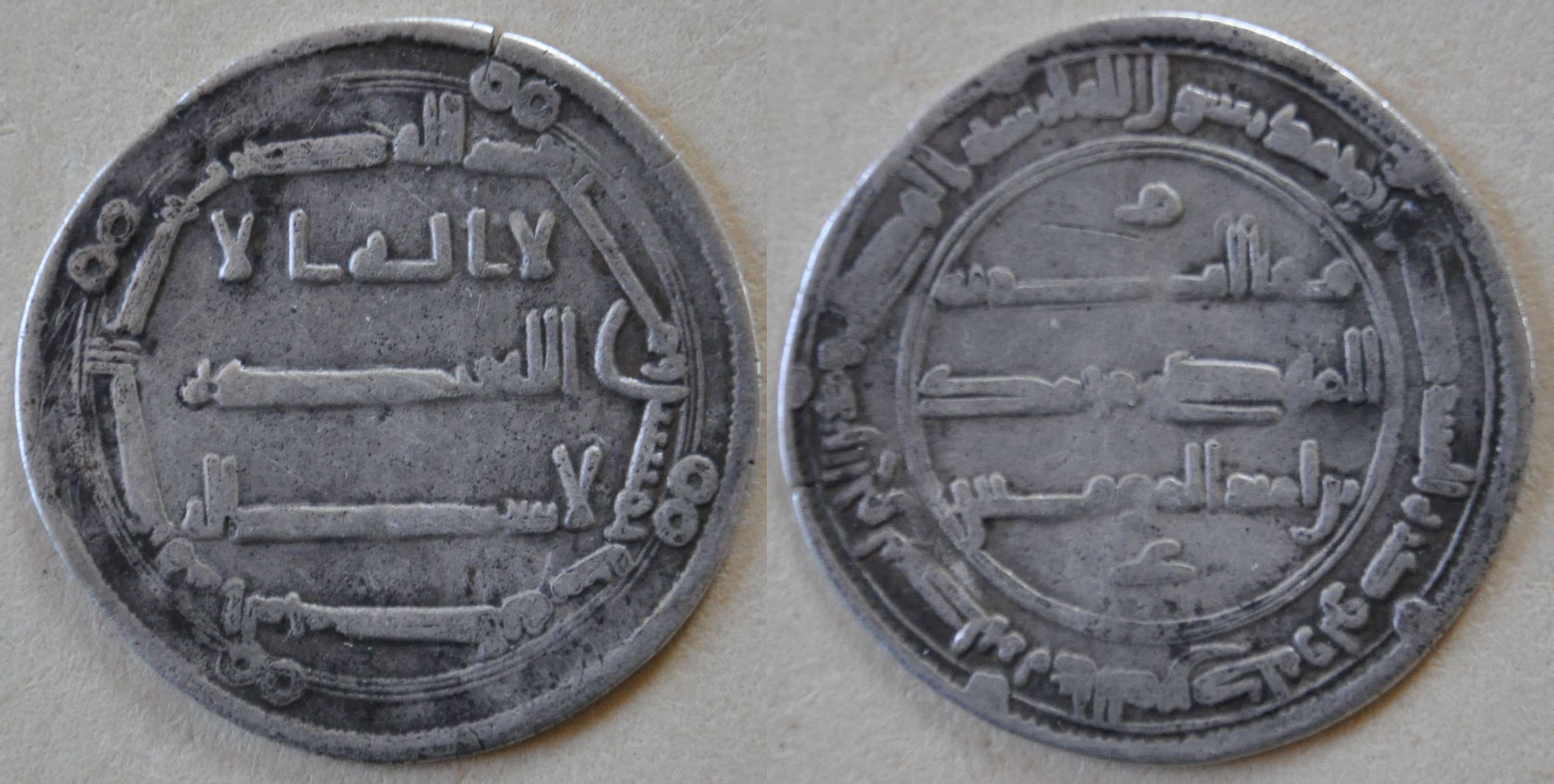 Un dirham en argent du calife Al Mansur (AH 136-158) (754-775 AD) de la dynastie abbasside, émission en AH 150 (767 AD) à Al Mohammadiya (Téhéran, Iran). Dimension : 25 mm Poids : 2.55 g. Référence : Mitchiner WI 148